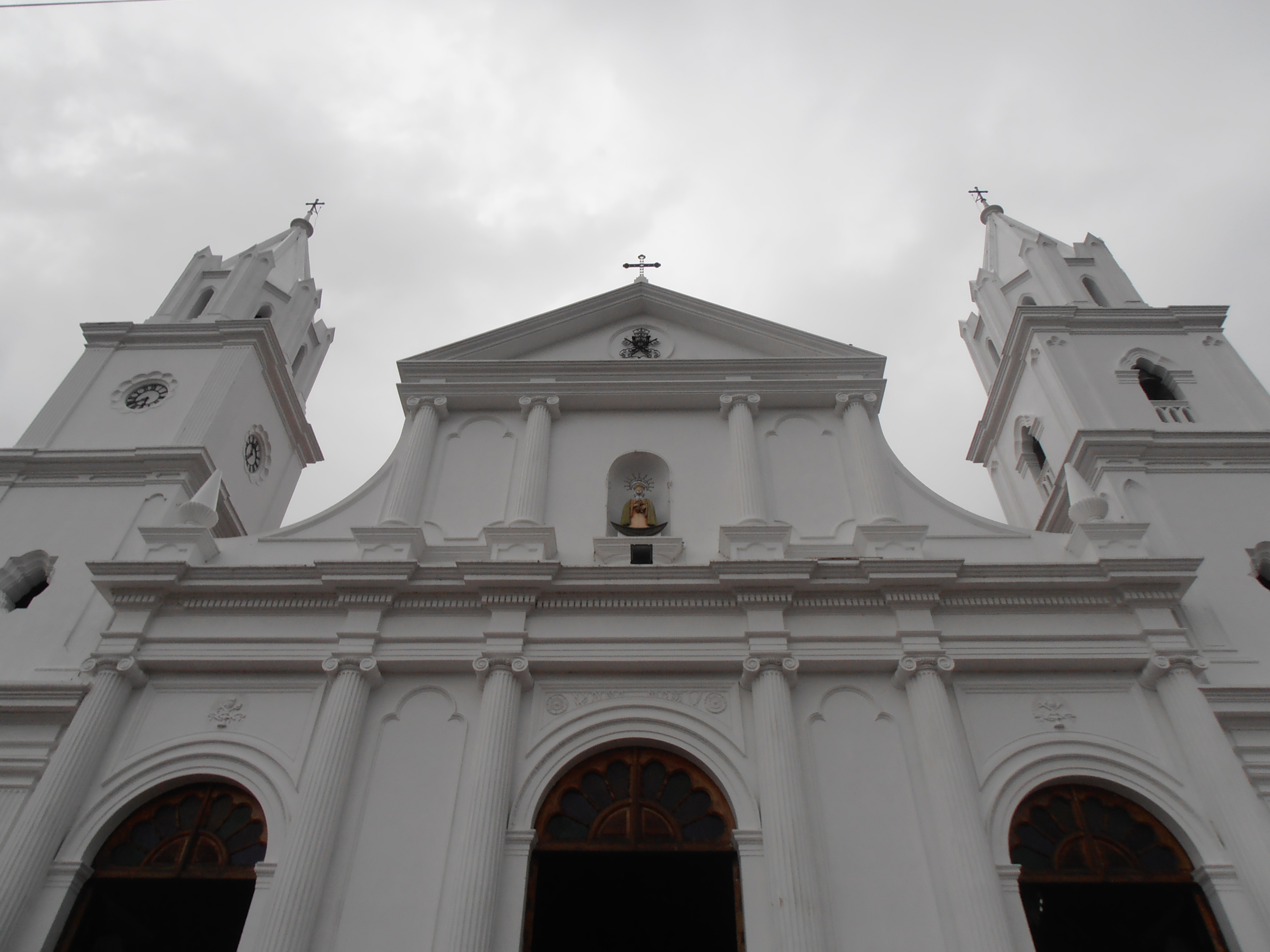 Iglesia de Nuestra Señora de la Consolación de Táriba - Estado Tachira